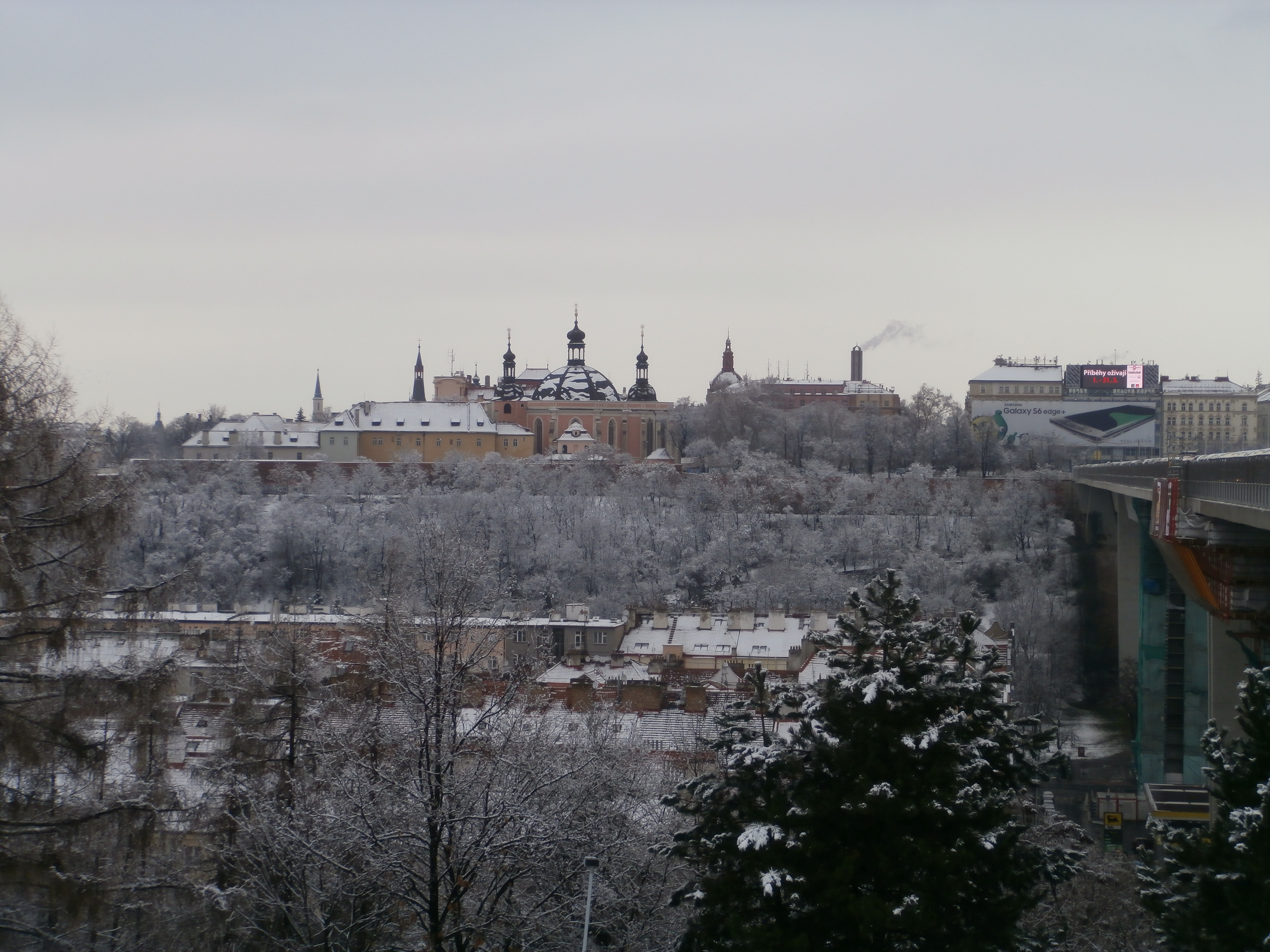 Kostel Nanebevzetí Panny Marie a svatého Karla Velikého na Novém Městě v Praze v zimě, od jihu od stanice metra Vyšehrad, 1. 3. 2016